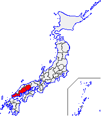 山陽地方の位置